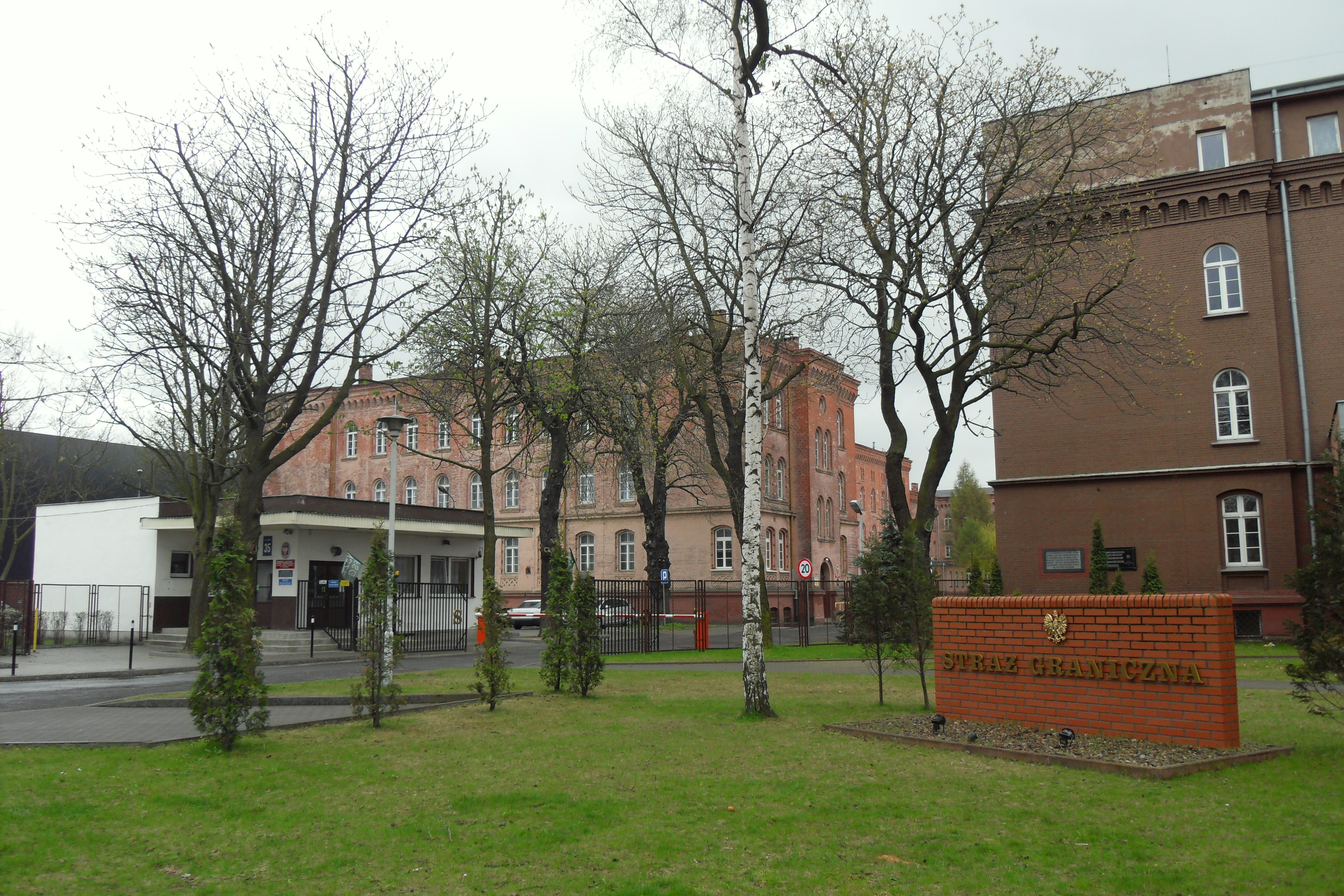 Morski Oddział Straży Granicznej. Gdańsk Nowy Port, ul. Oliwska 35.